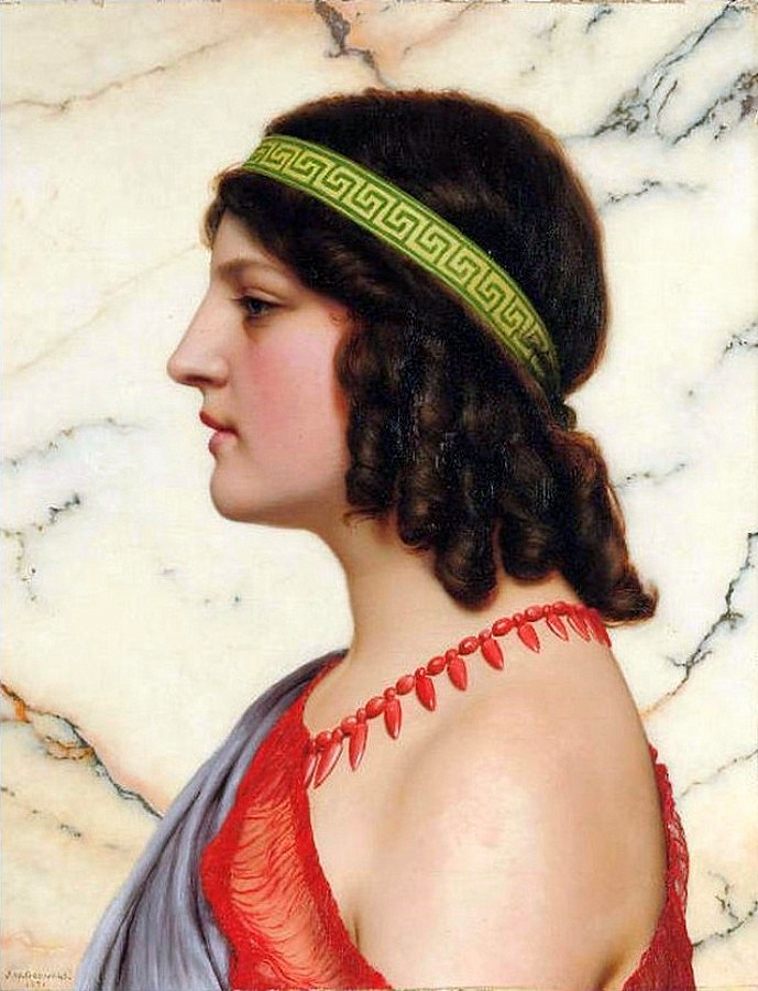 Praxilla. John William Godward. Óleo sobre lienzo. 1922.